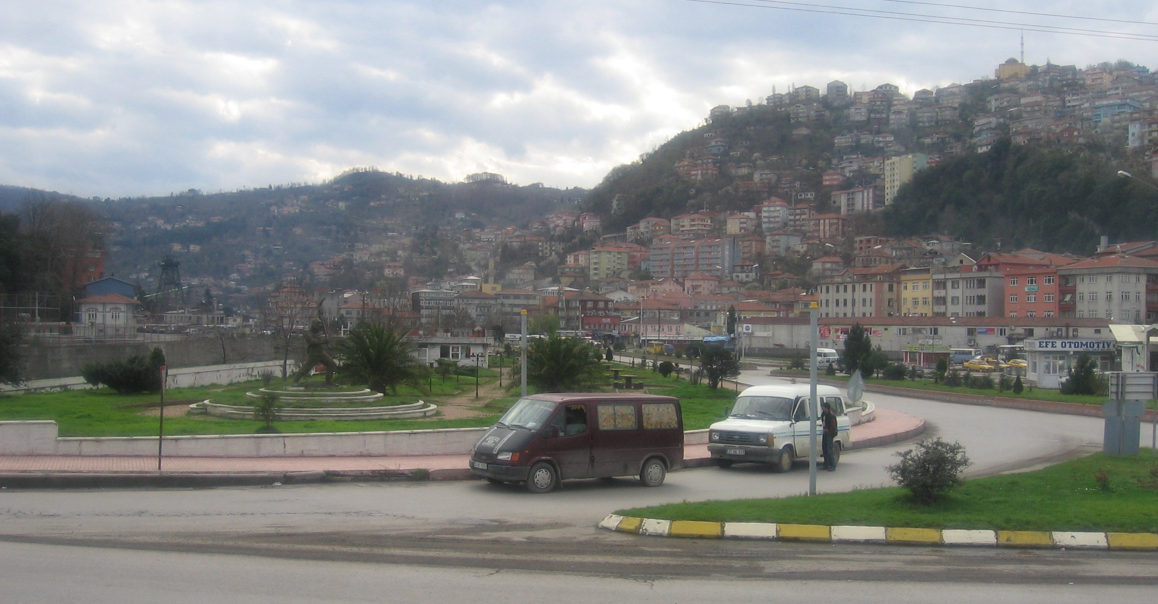 Kozlu